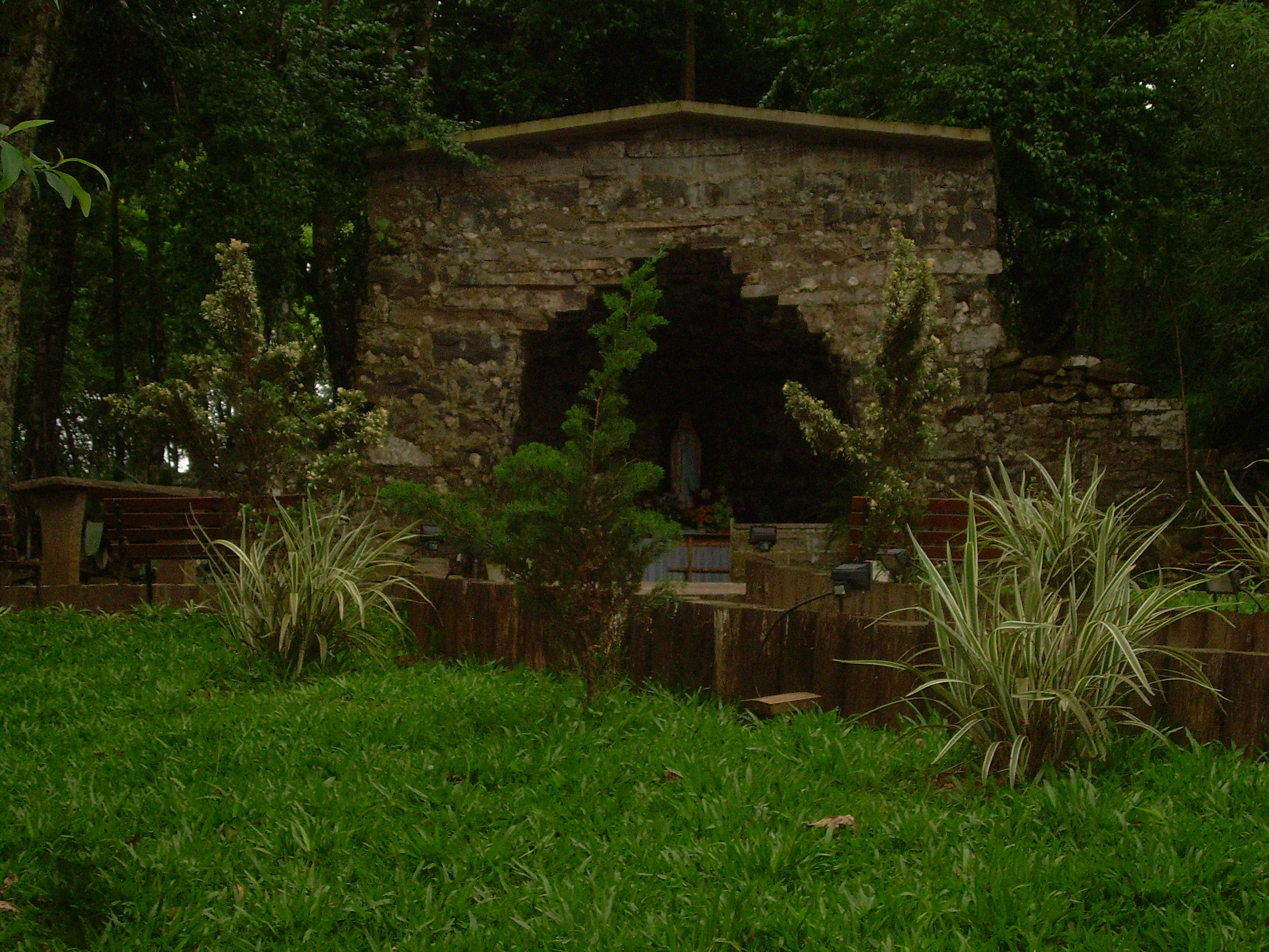 Gruta de la Virgen de Lourdes, construida en basalto. Se ubica en la cima de una colina.